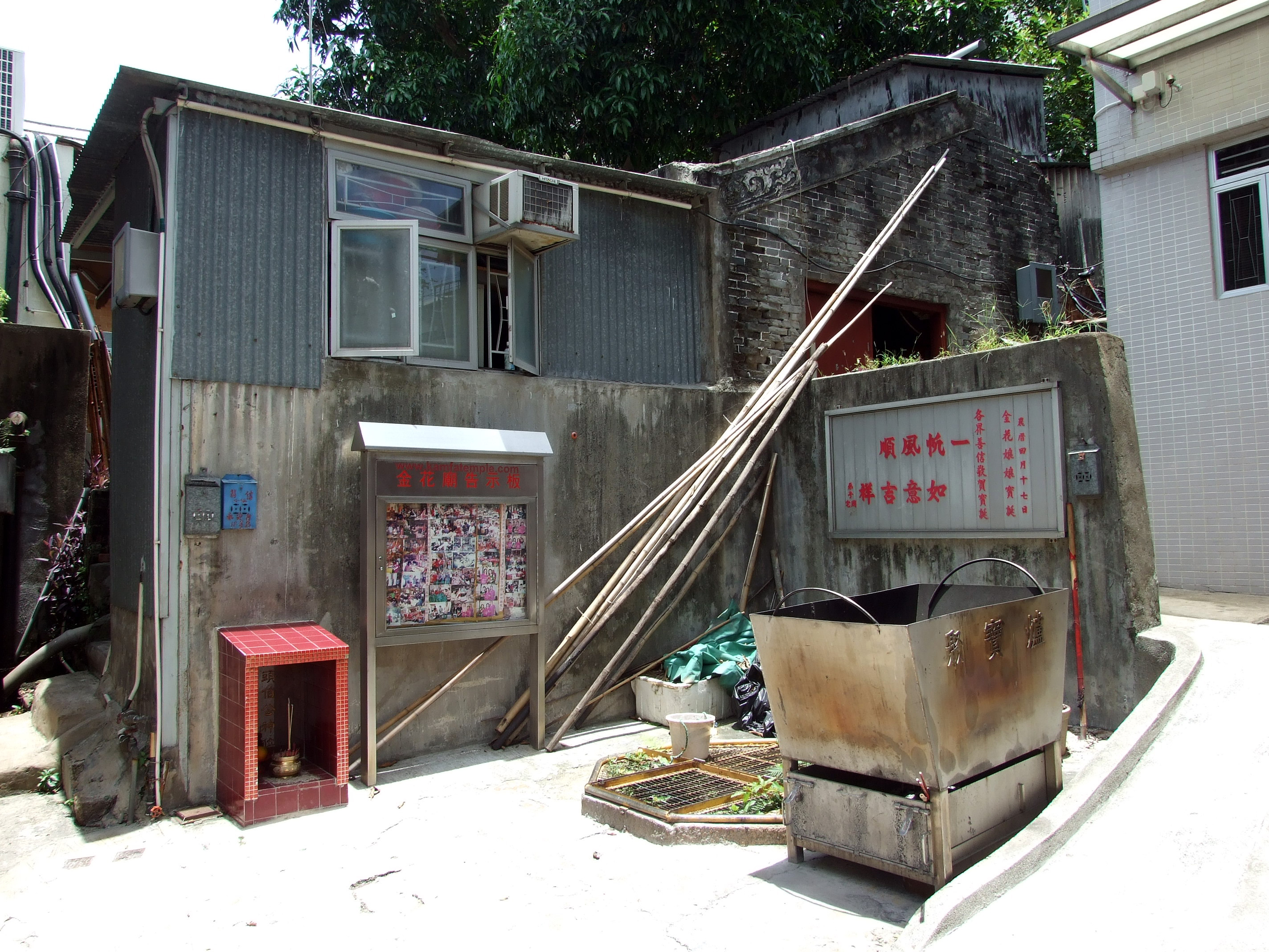 中文（香港）: 坪洲山頂村義祠